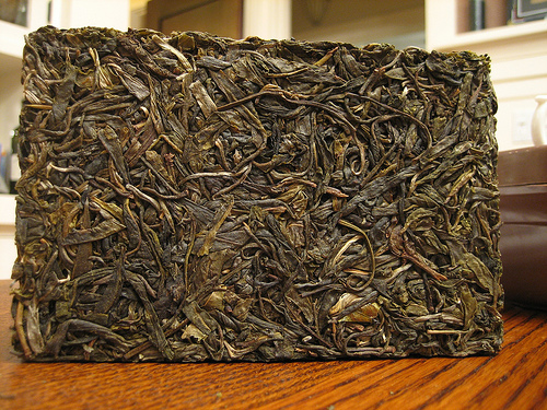 Zhuan cha, Dadugang 2006 raw pu-erh zhuancha.